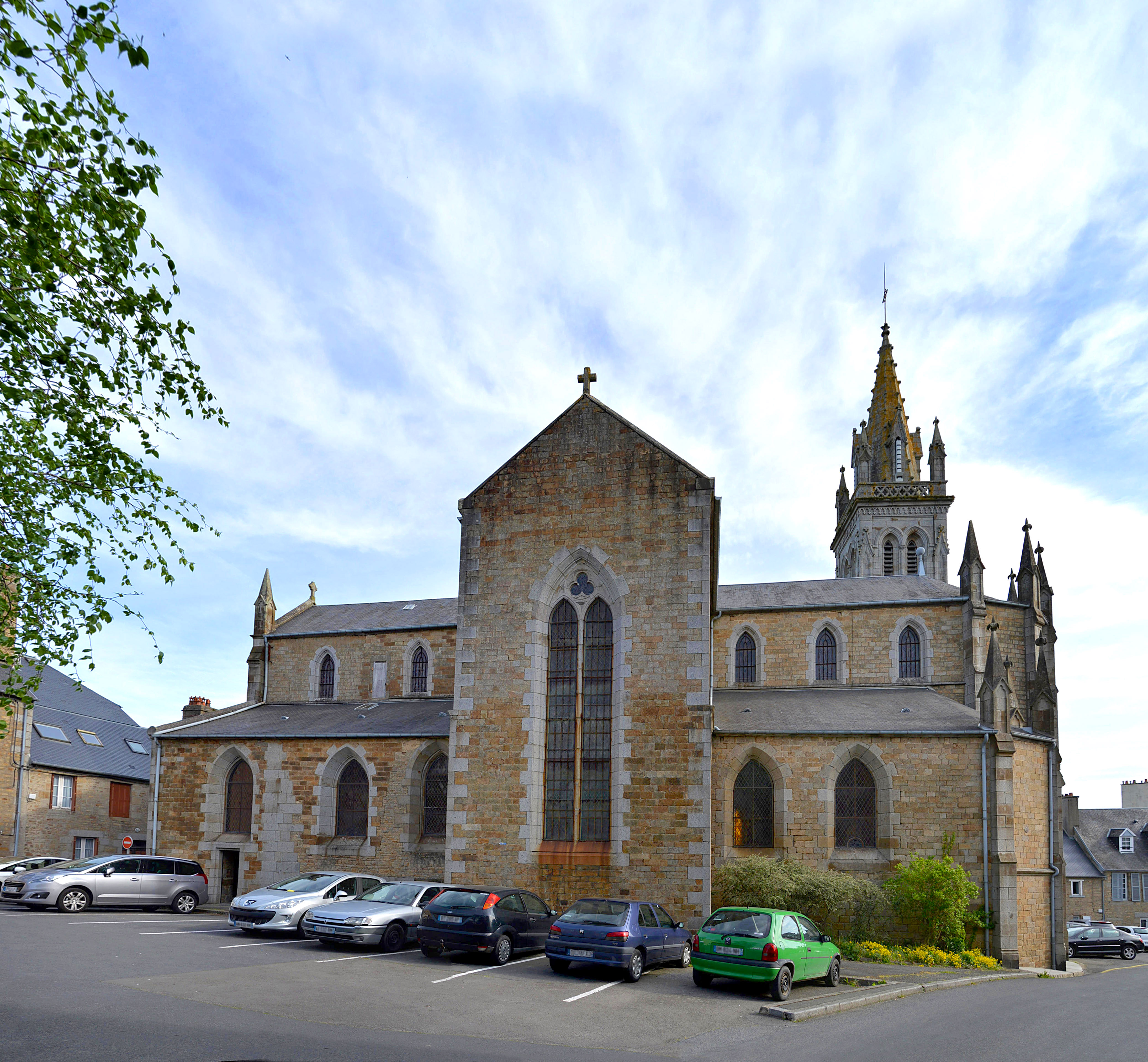 Avranches (Manche)